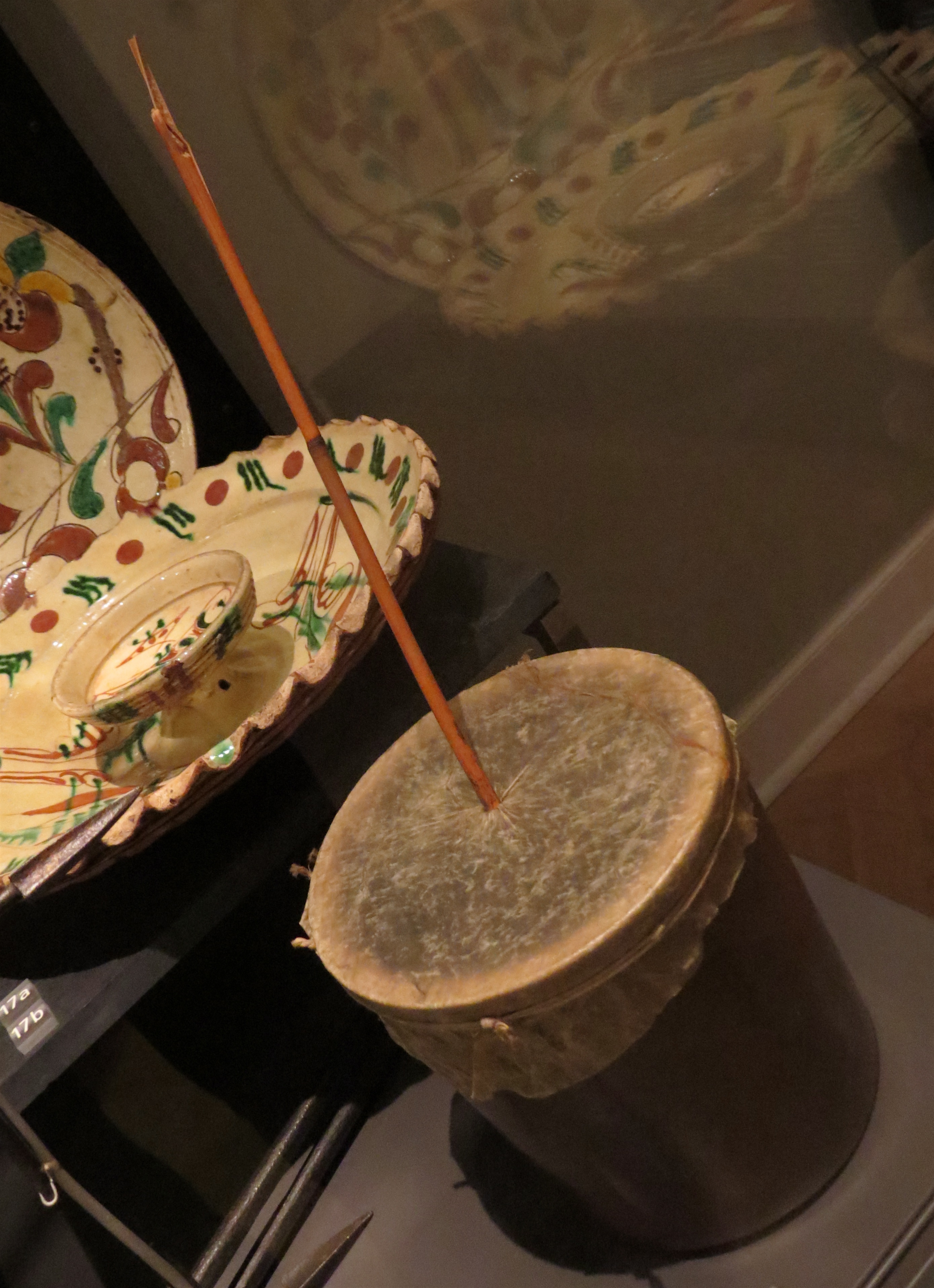 Rumlepotte fra Slesvig, 1929, Nationalmuséet i København